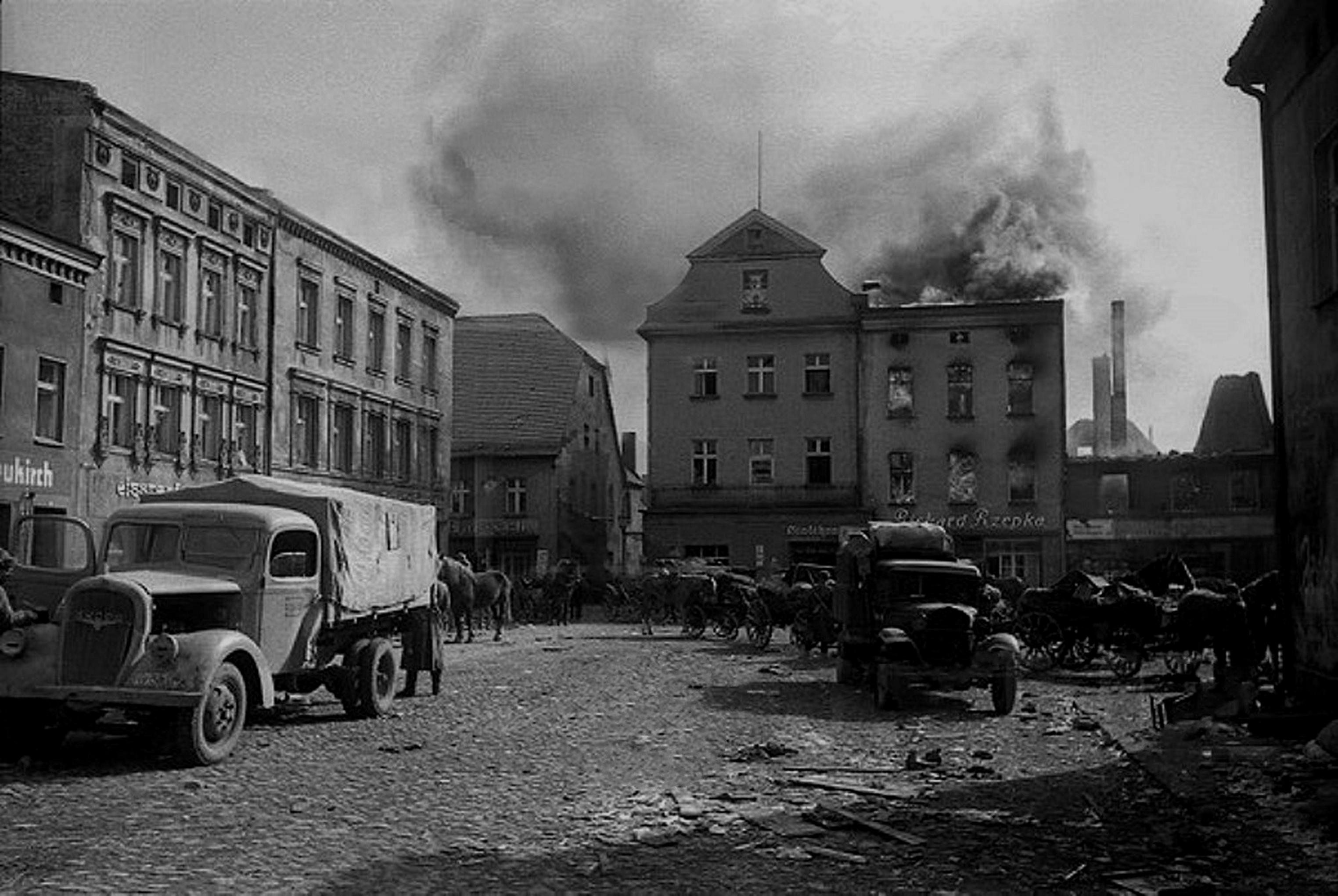 Zajęcie Białej przez Armię Czerwoną 1945